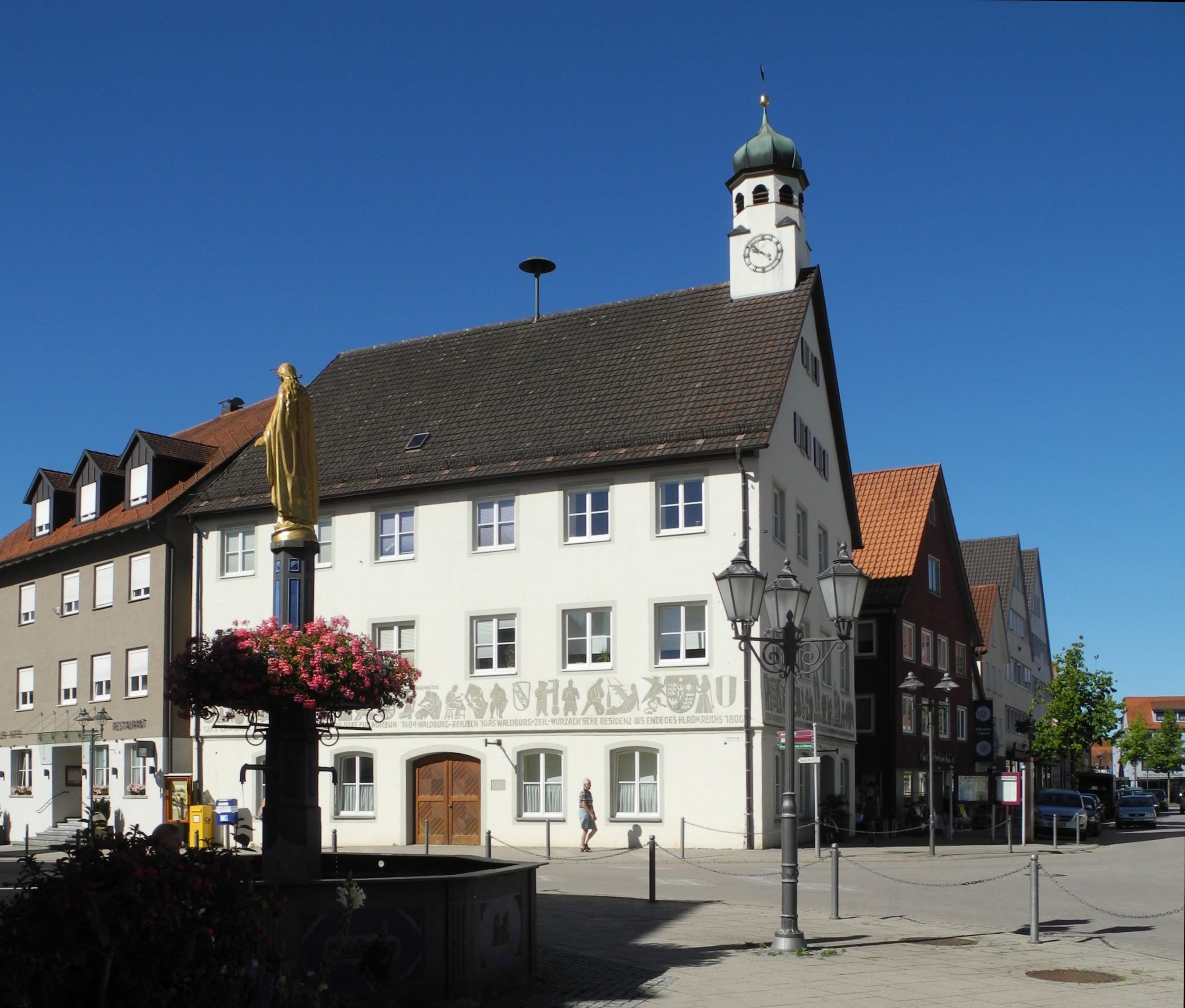 Bad Wurzach - Rathaus mit Stadtbrunnen